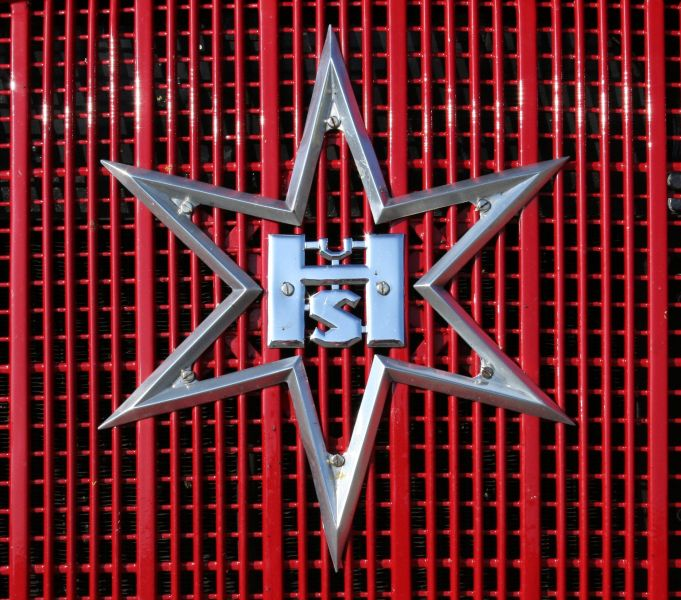 Firmenlogo Henschel und Sohn